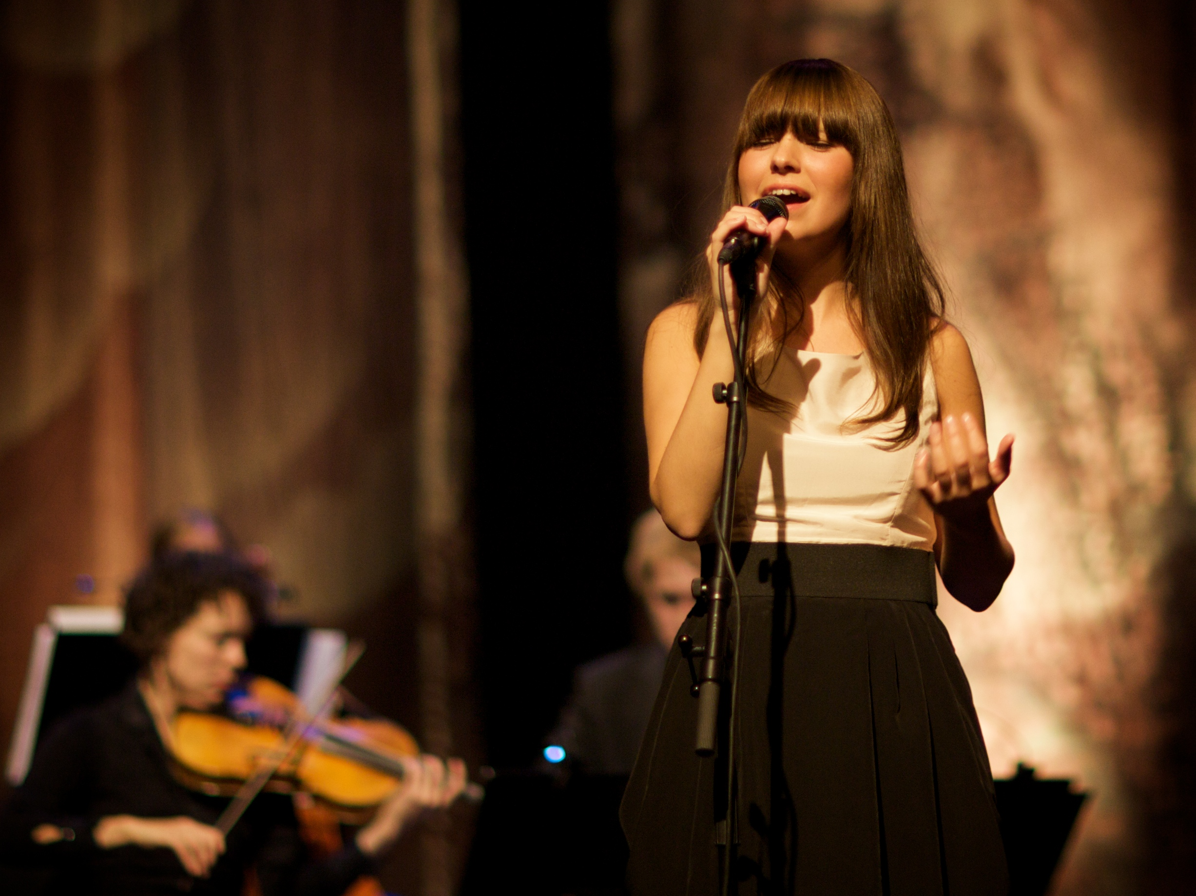 Marit Larsen med Trondheimssolistene i Ibsenhuset